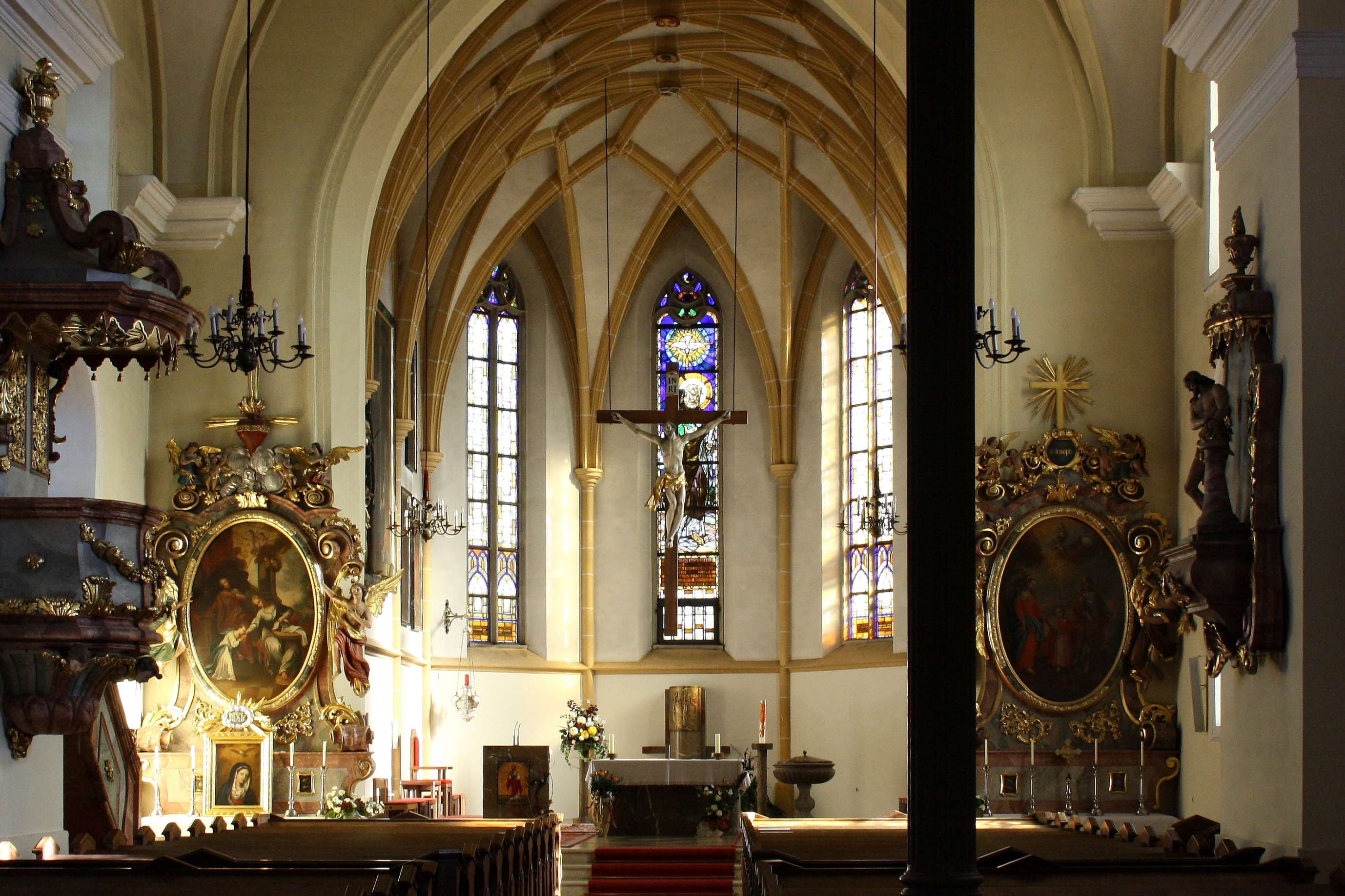 Innenansicht Richtung Altar der Pfarrkirche von Böheimkirchen.